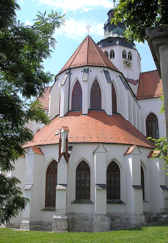 Klosterkirche Kaisheim (Landkreis Donau-Ries, Bayern. Der Chor. Eigene Aufnahme, Juli 2006 / Abbey church Kaisheim near Donauwoerth, Bavaria, Germany. The choir. Own photo, July 2006